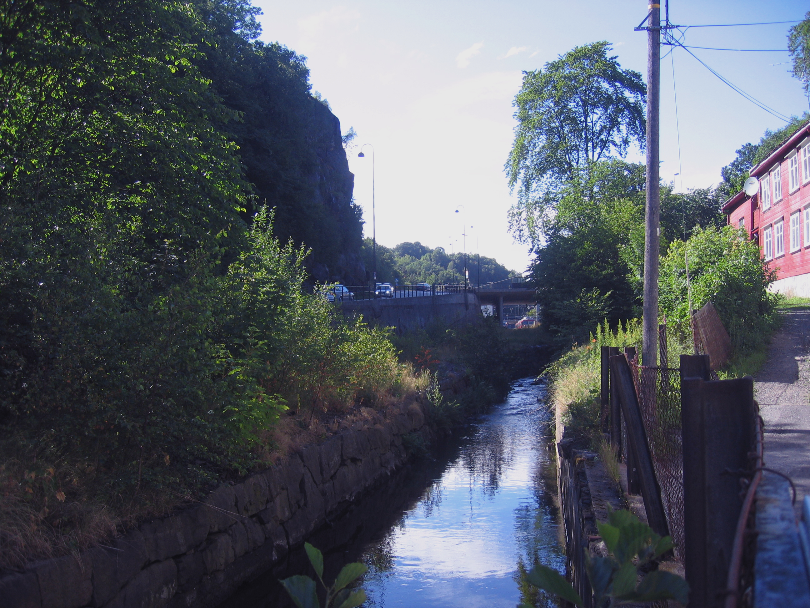 Barbuelva nedre del. Mølleheia og Møllebakken tv. Arendal stasjon i bakgrunnen.